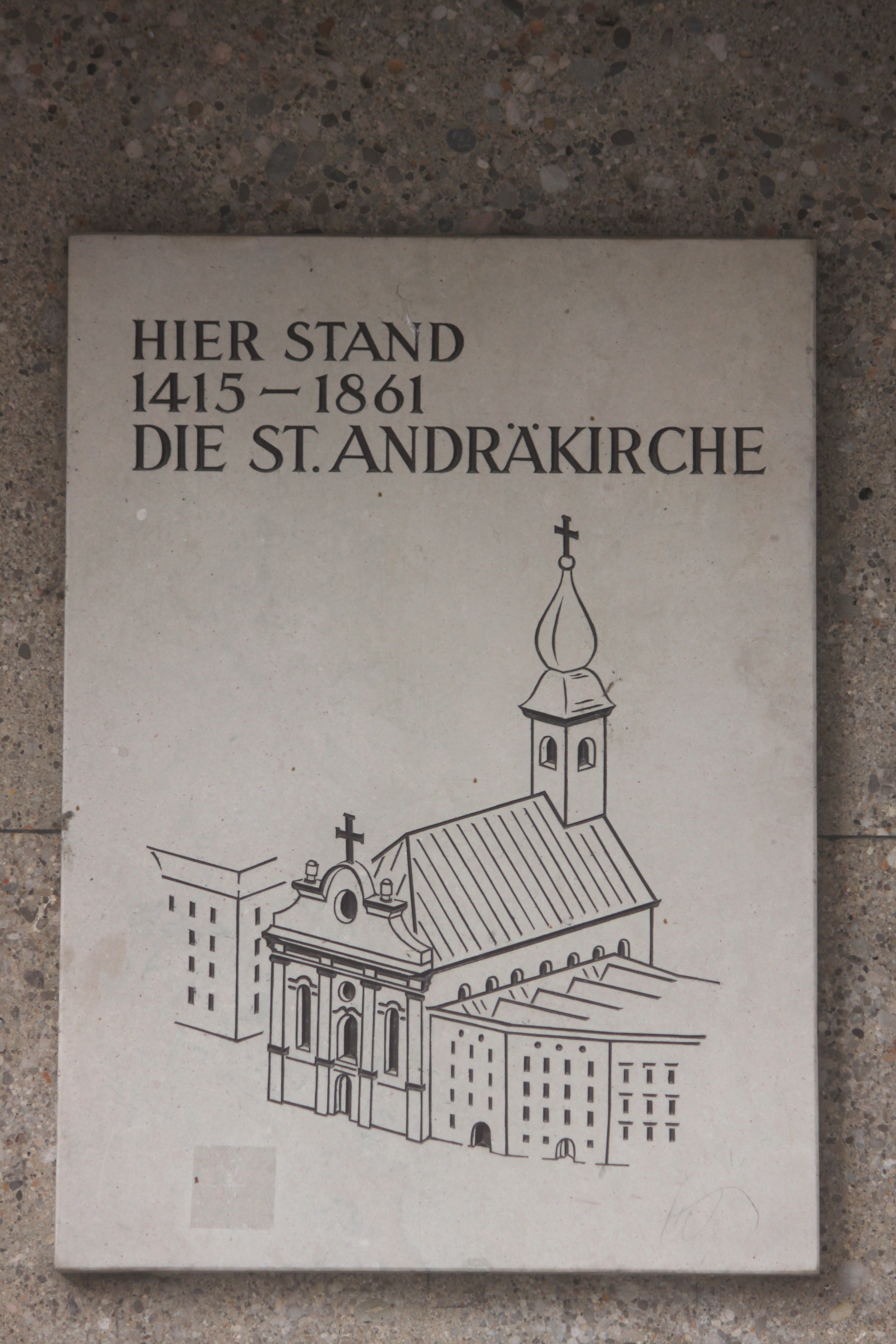 Bürgerhaus, Cafe Koller, Dreifaltigkeitsgasse 2, Fassadenfront Linzer Gasse 1, Gedenktafel zur ehemaligen St. Andräkirche von 1415 bis 1861